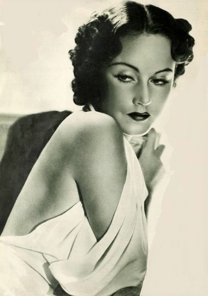 Fay Wray